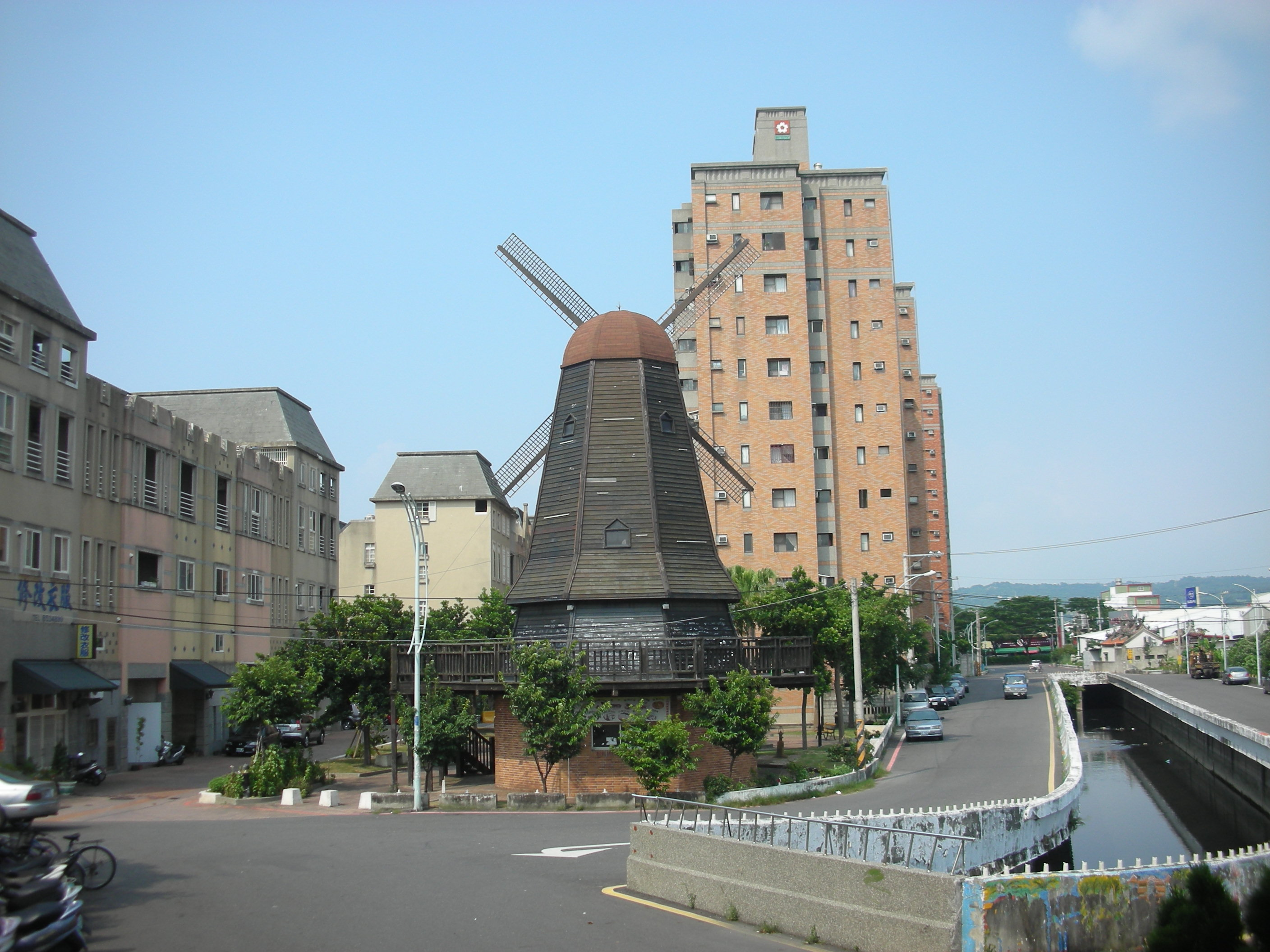 大村車站站前風景